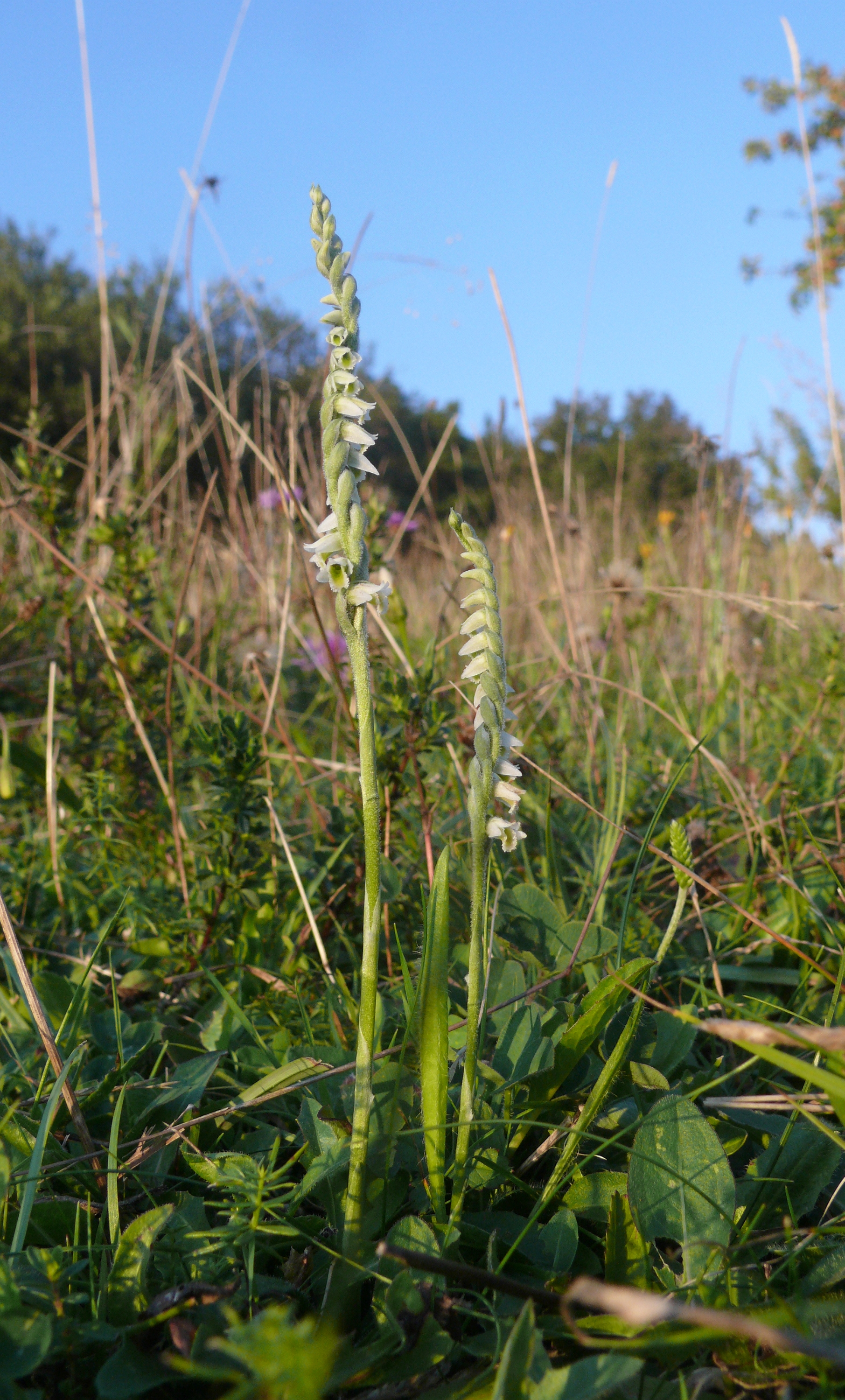 Spiranthes spiralis, Frankenhöhe, Deutschland